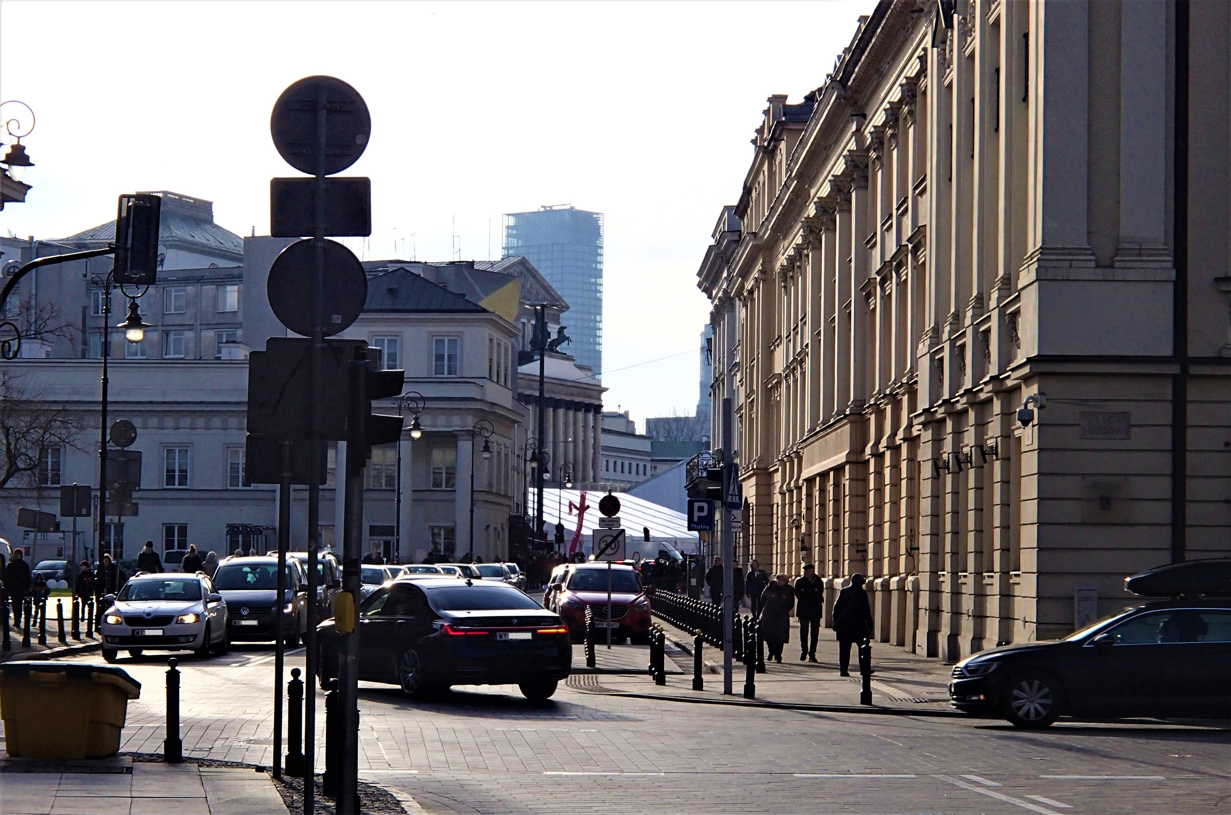 W oddali widoczny budynek Teatru Wielkiego, po prawej fragment Pałacu Biskupów Krakowskich